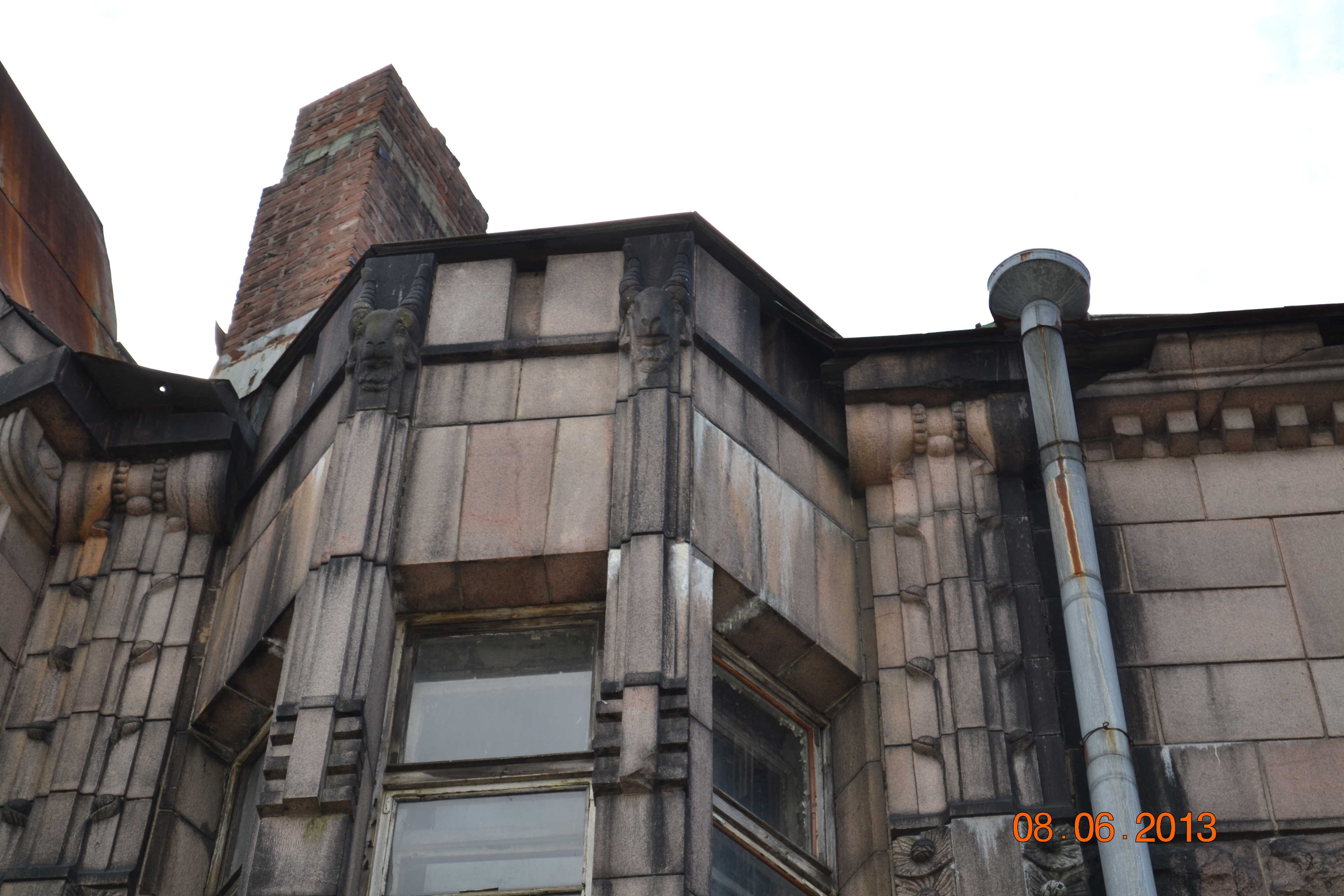 Здание фирмы хаакмен и к (Санкт-Петербург и Лен.область, Выборг, подгорная улица, 14, северный вал, 5)